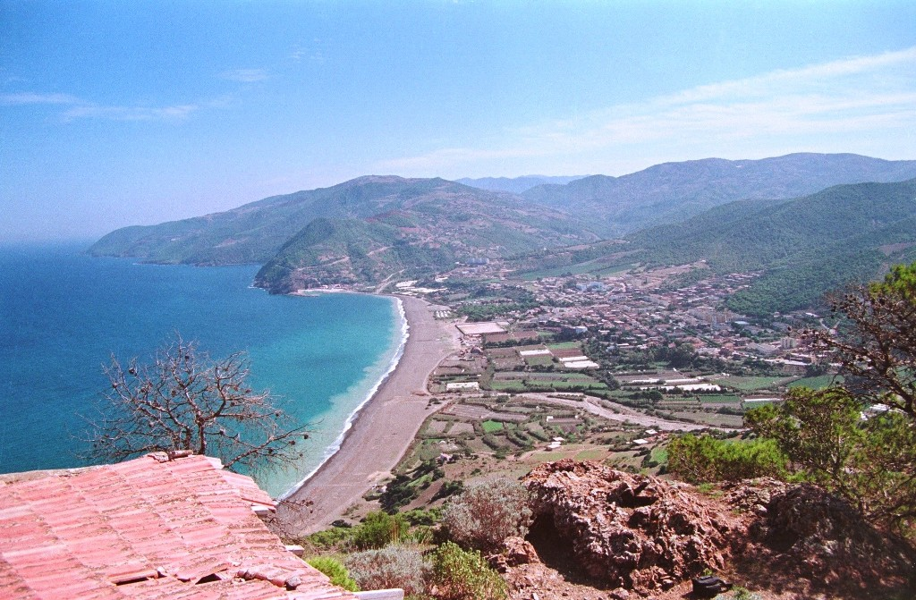 Vue panoramique de la ville de Beni Haoua ( Ex.Francis Garnier ).